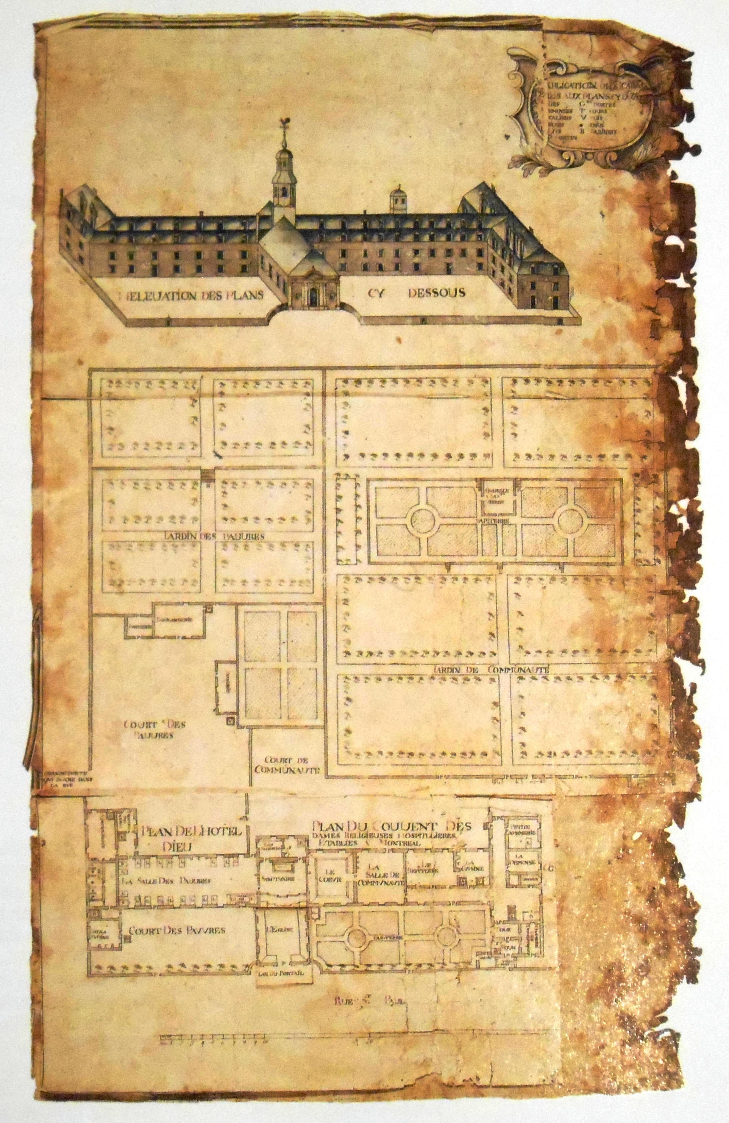 Plan de l'Hôtel-Dieu de Montréal, Canada L'Hôtel-Dieu avant l'incendie de 1695